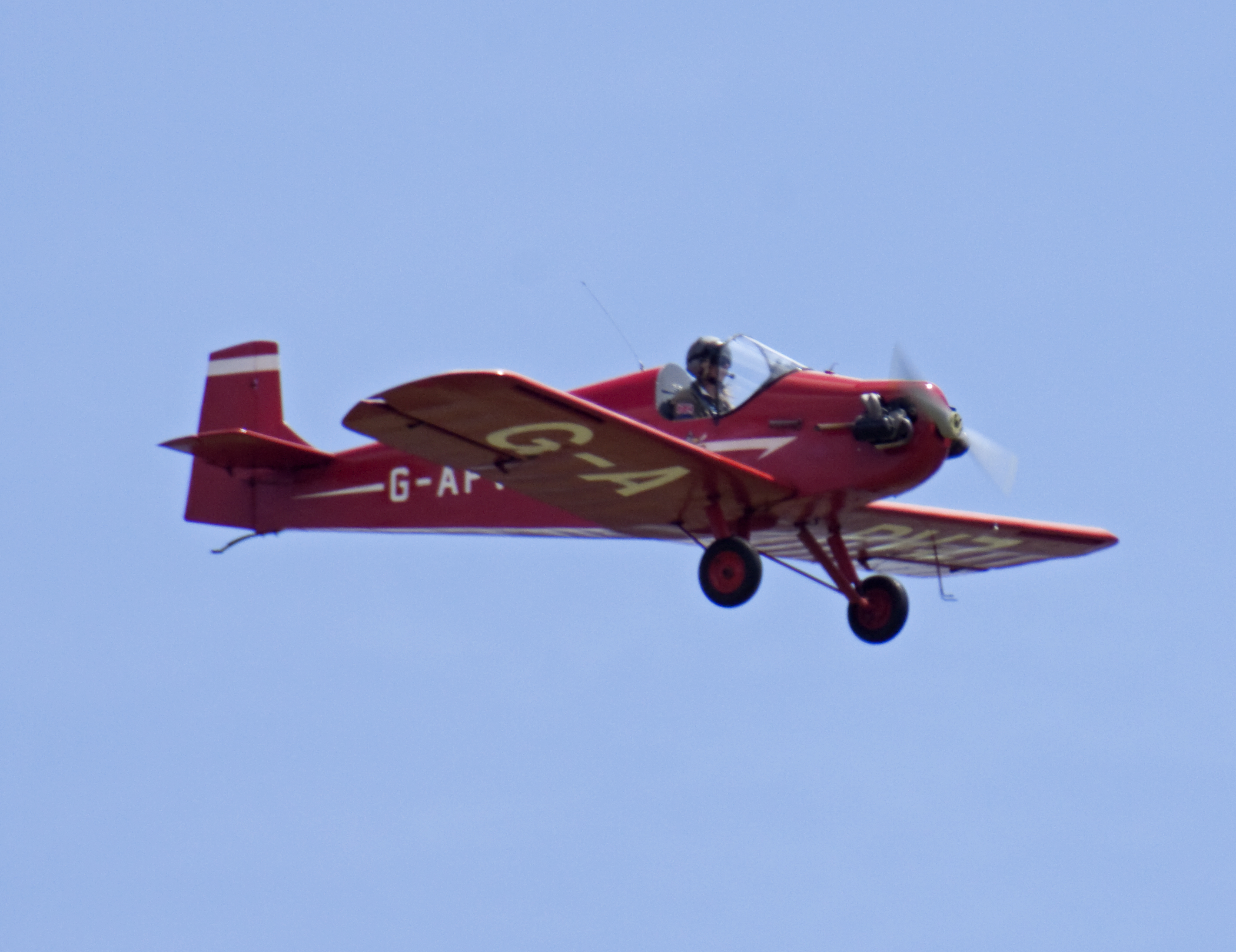 D31 Turbulent 176